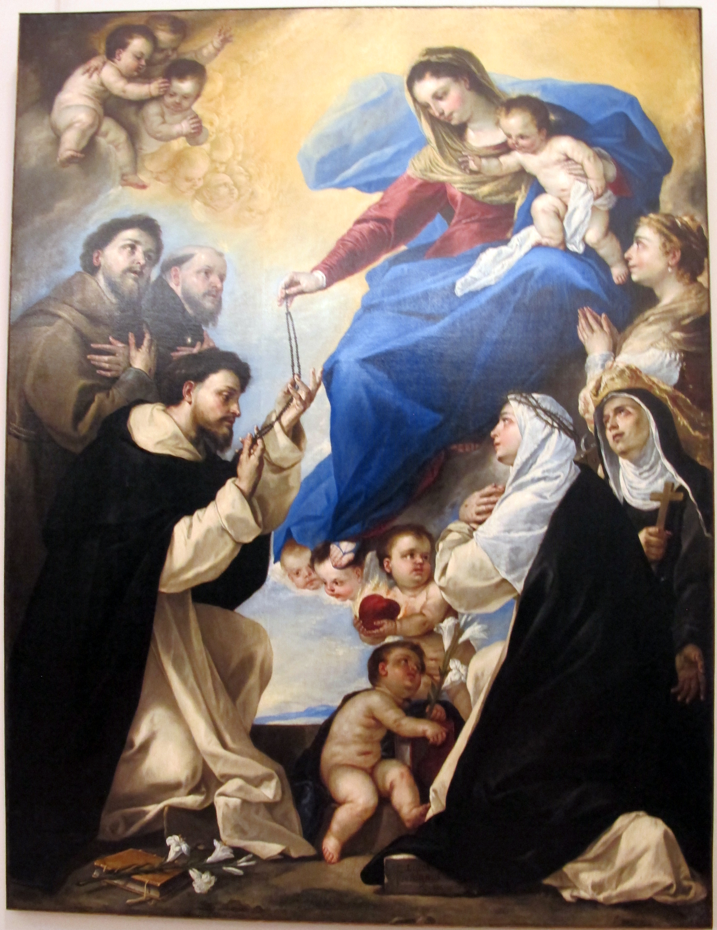 Galleria Napoletana (Museo di Capodimonte)